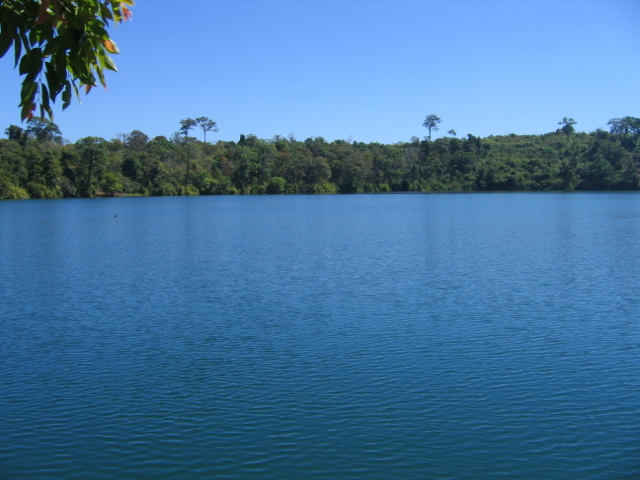 Volcanic lake Yak Loum, near Banlung